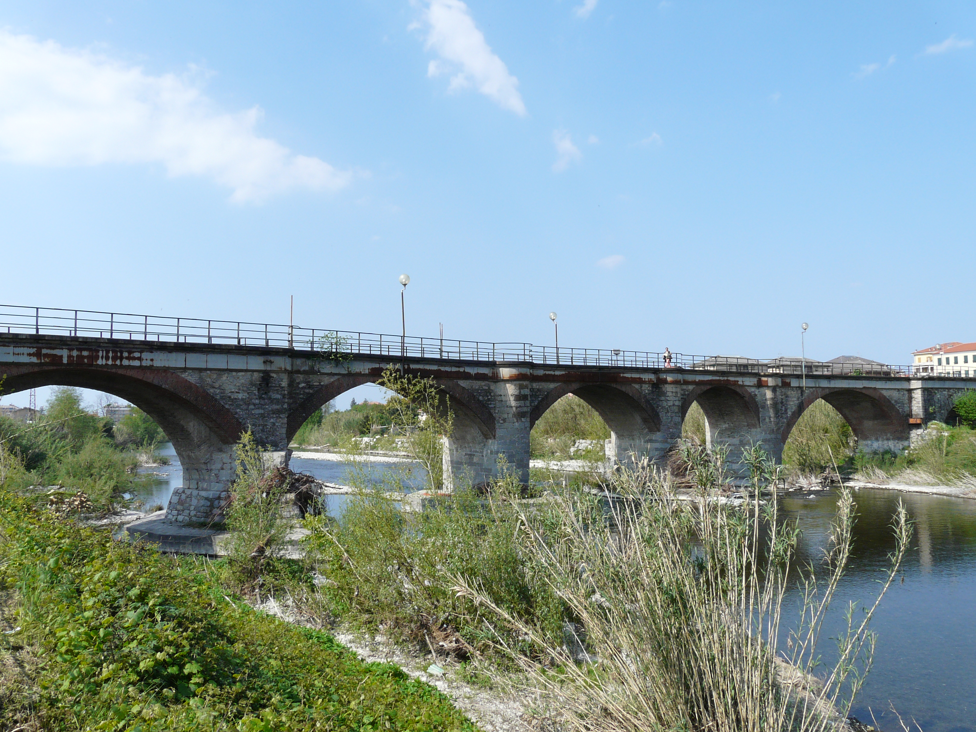 Ponte della Maddalena, lato sponda di Lavagna, Liguria, Italia